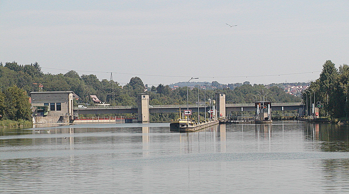 Die Schleuse in Remseck-Aldingen